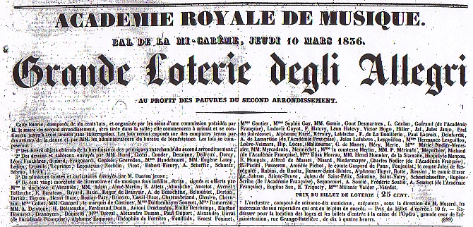 Annonce d'une loterie et un bal masqué donné à l'opéra de Paris sous la direction de Philippe Musard pour la Mi-Carême 1836.